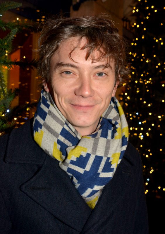 Swann Arlaud au dîner des révélations des César du cinéma